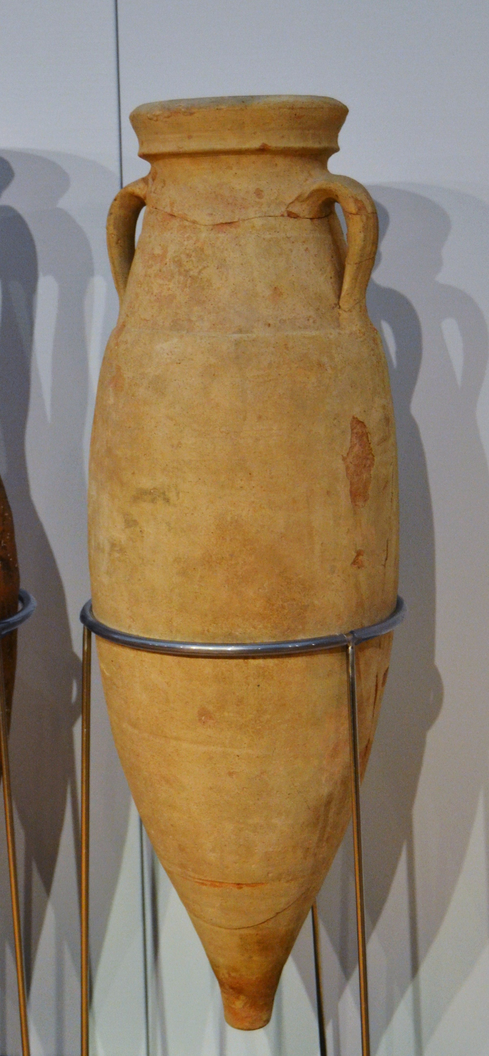 Àmfora de salaons, ceràmica Dressel 21/22. Segle I, Lucentum (Tossal de Manises, Alacant), Museu Arqueològic d'Alacant.